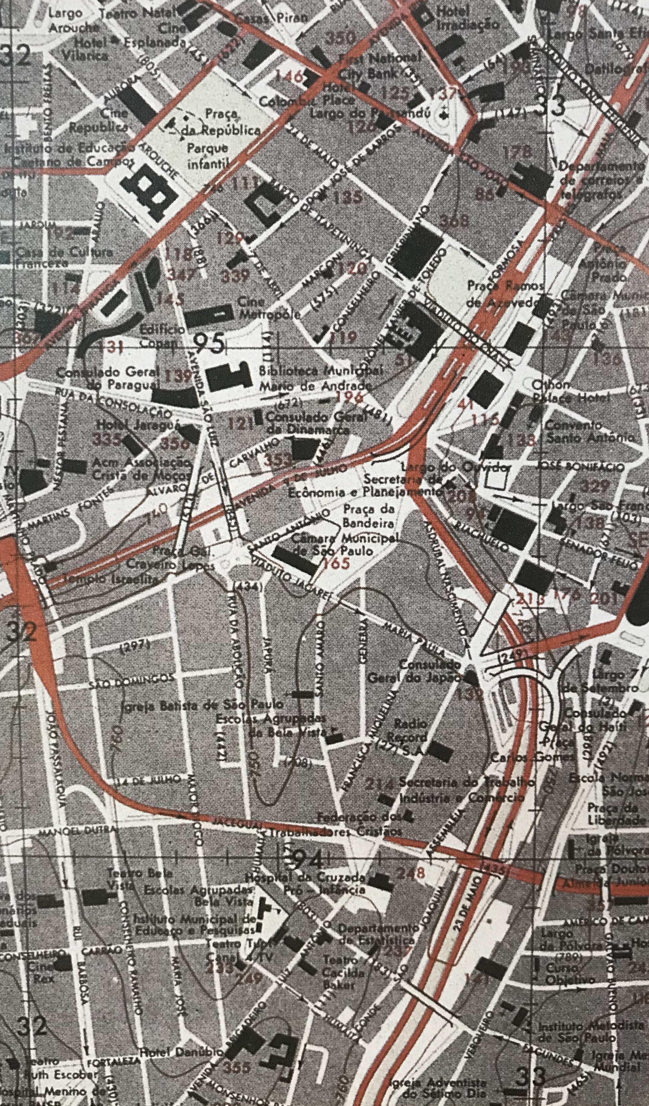 IMAGEM 5